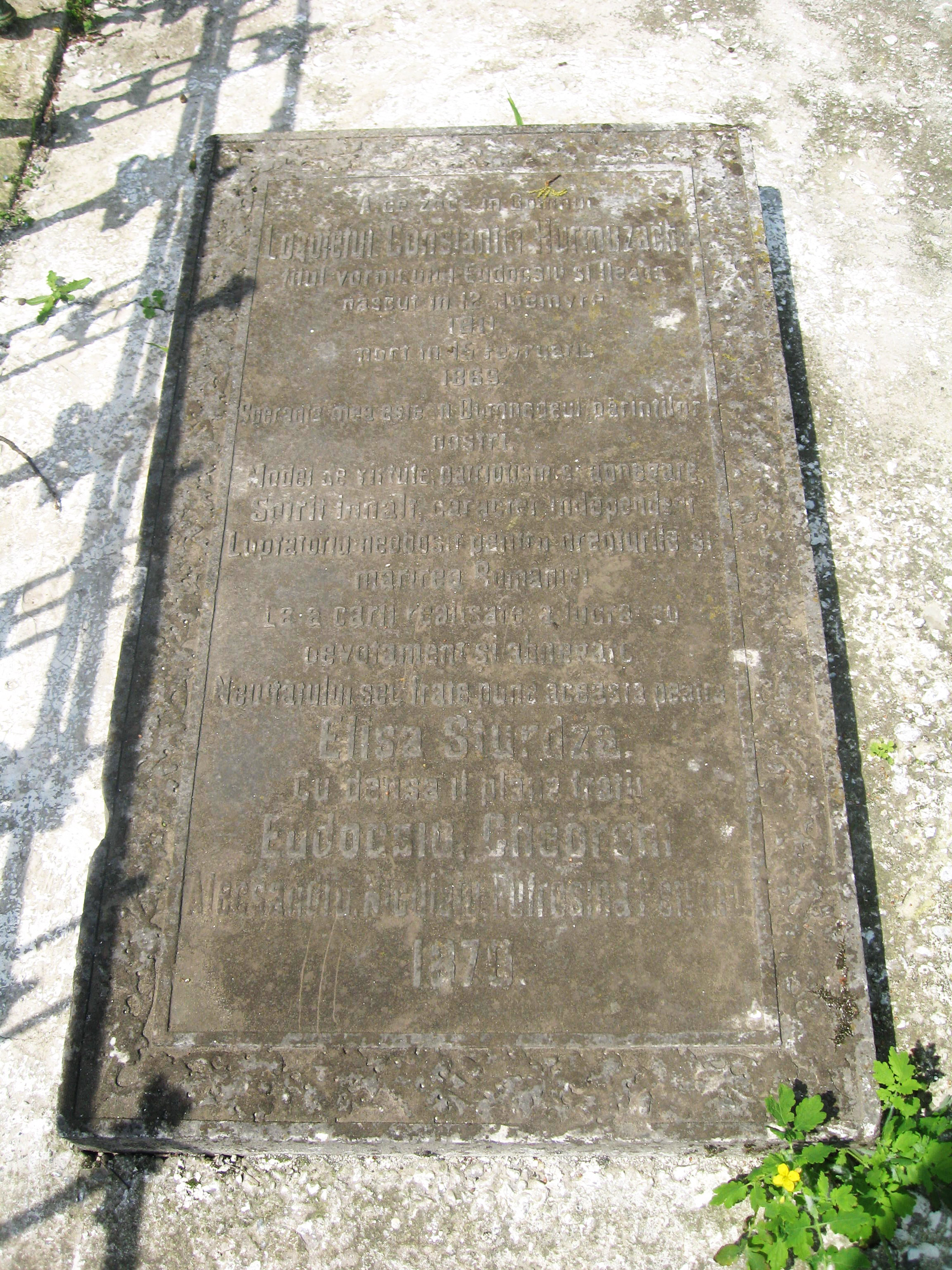 Biserica Pogorarea Sf. Duh din Dulcesti